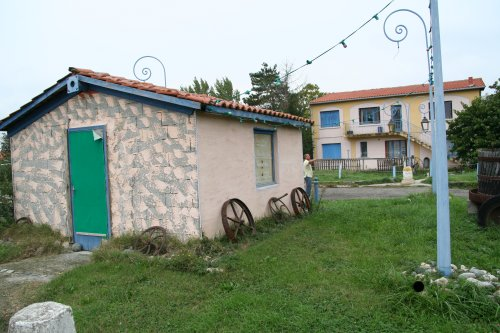 La "camera obscura du musée du Lherm Photo Jean-Daniel Dodin Publiée avec l'autorisation du musée